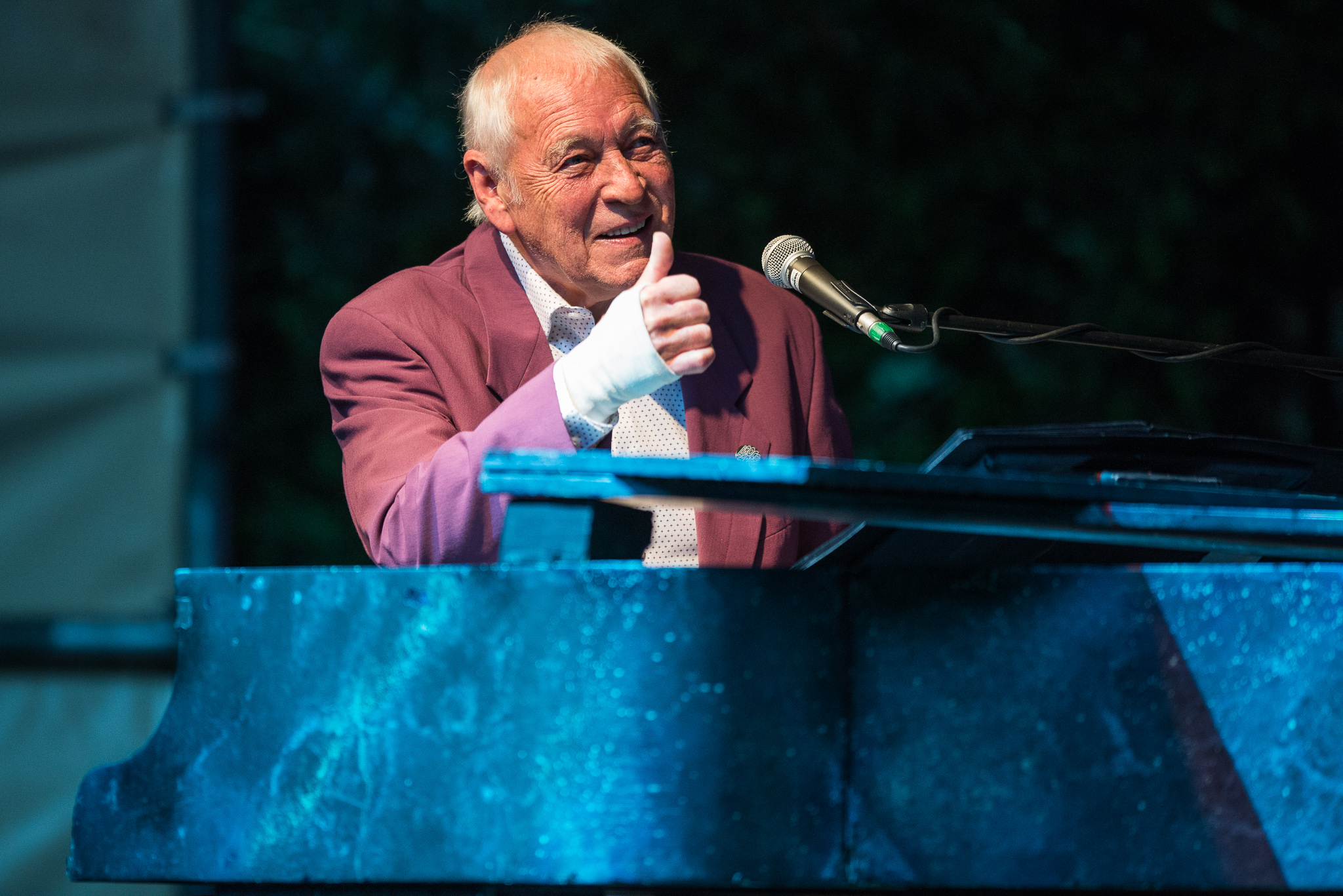 Concertbüro Franken,Gary Brooker,Konzert,Livekonzert,Livemusik,Musik,Procol Harum,Serenadenhof